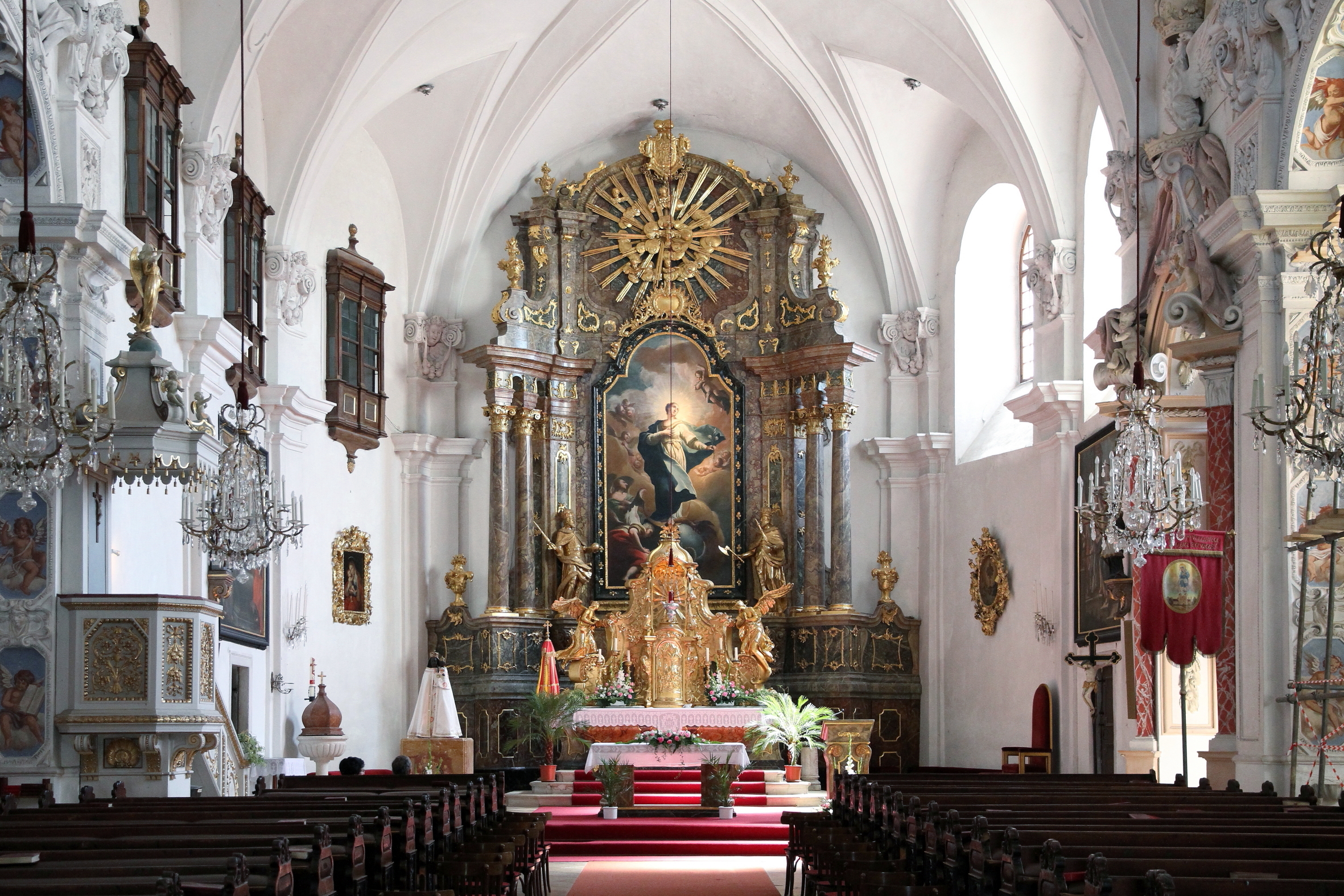 Die Basilika in der burgenländischen Marktgemeinde Loretto; Innenansicht.